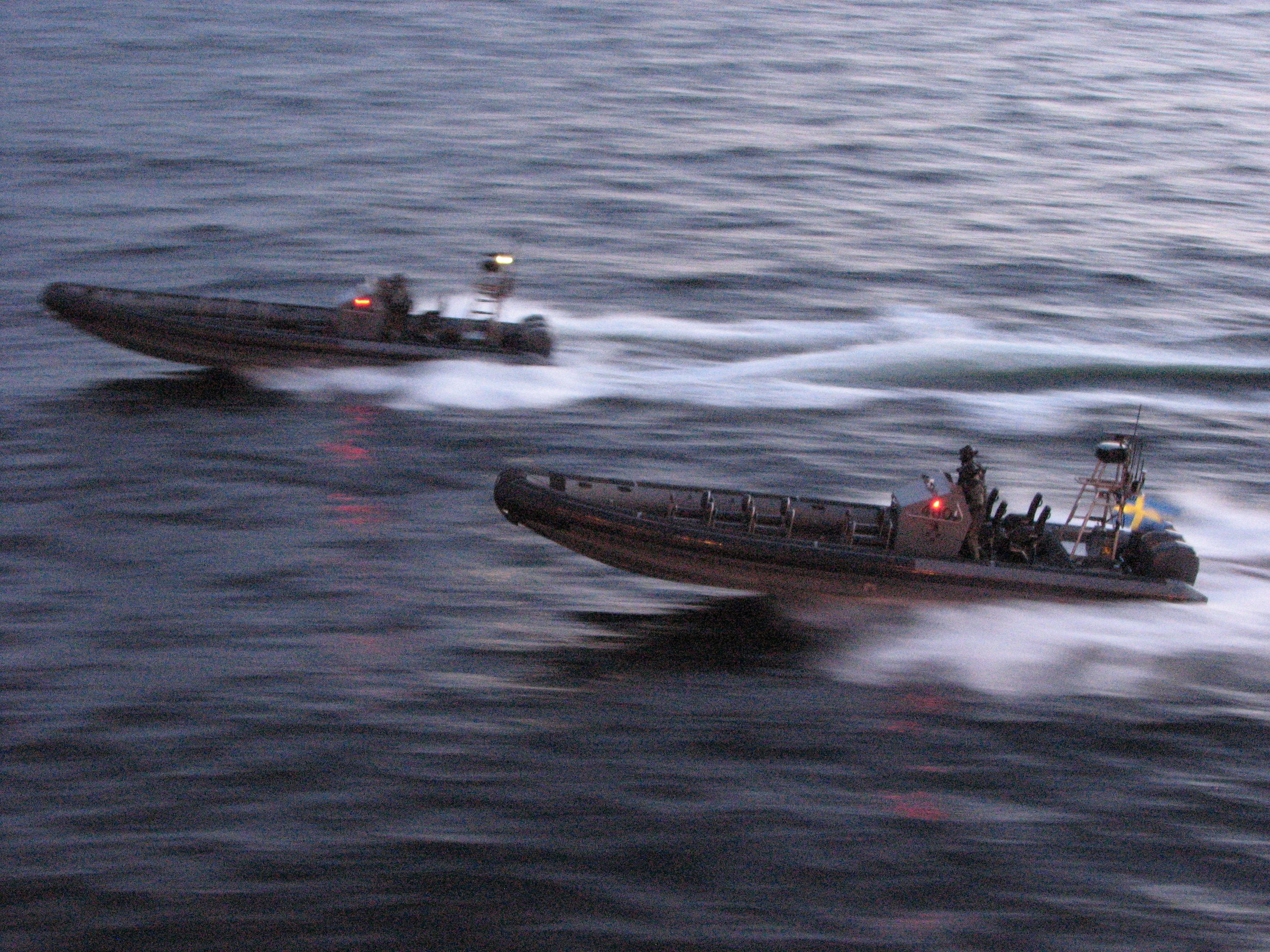 Kustjägare_07